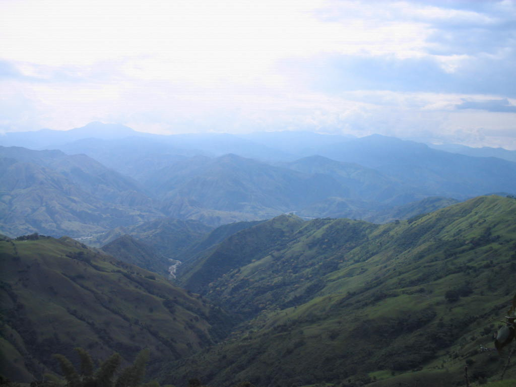 En el municipio de Armenia(Antioquia). Sitio denominado Morrón